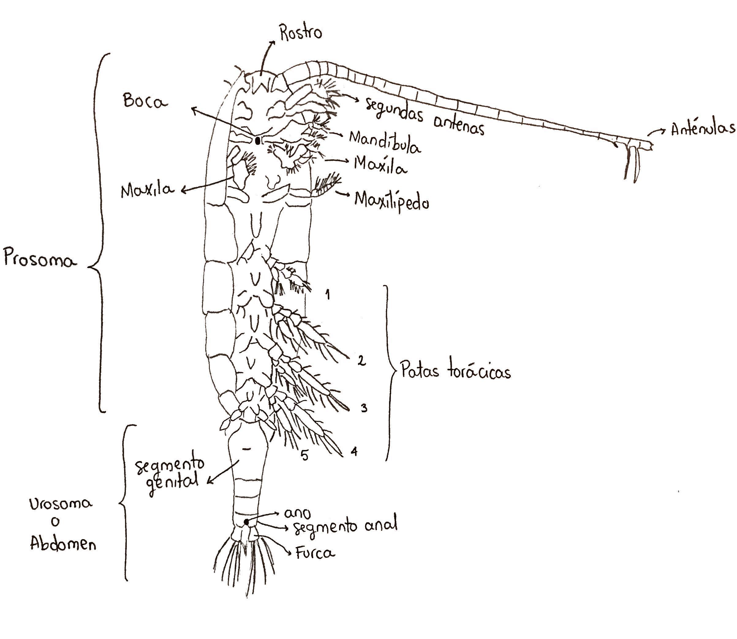 Morfología básica del orden calanoida